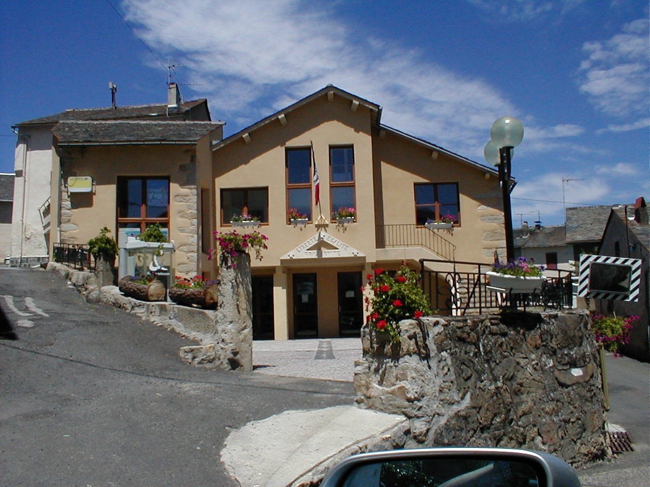 Mairie de Le PLA début des Travaux de restauration Juillet 1989